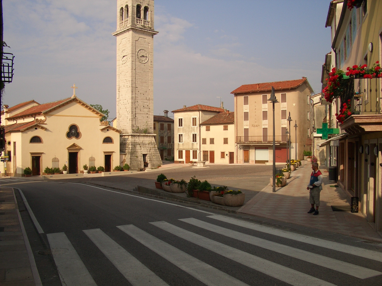 Veduta della piazza del paese